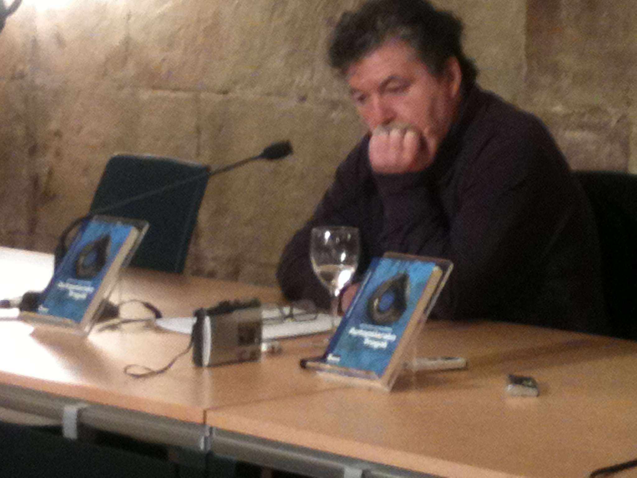 Koldo Izagirre "Autopsiaren frogak" aurkezten 2010ean.